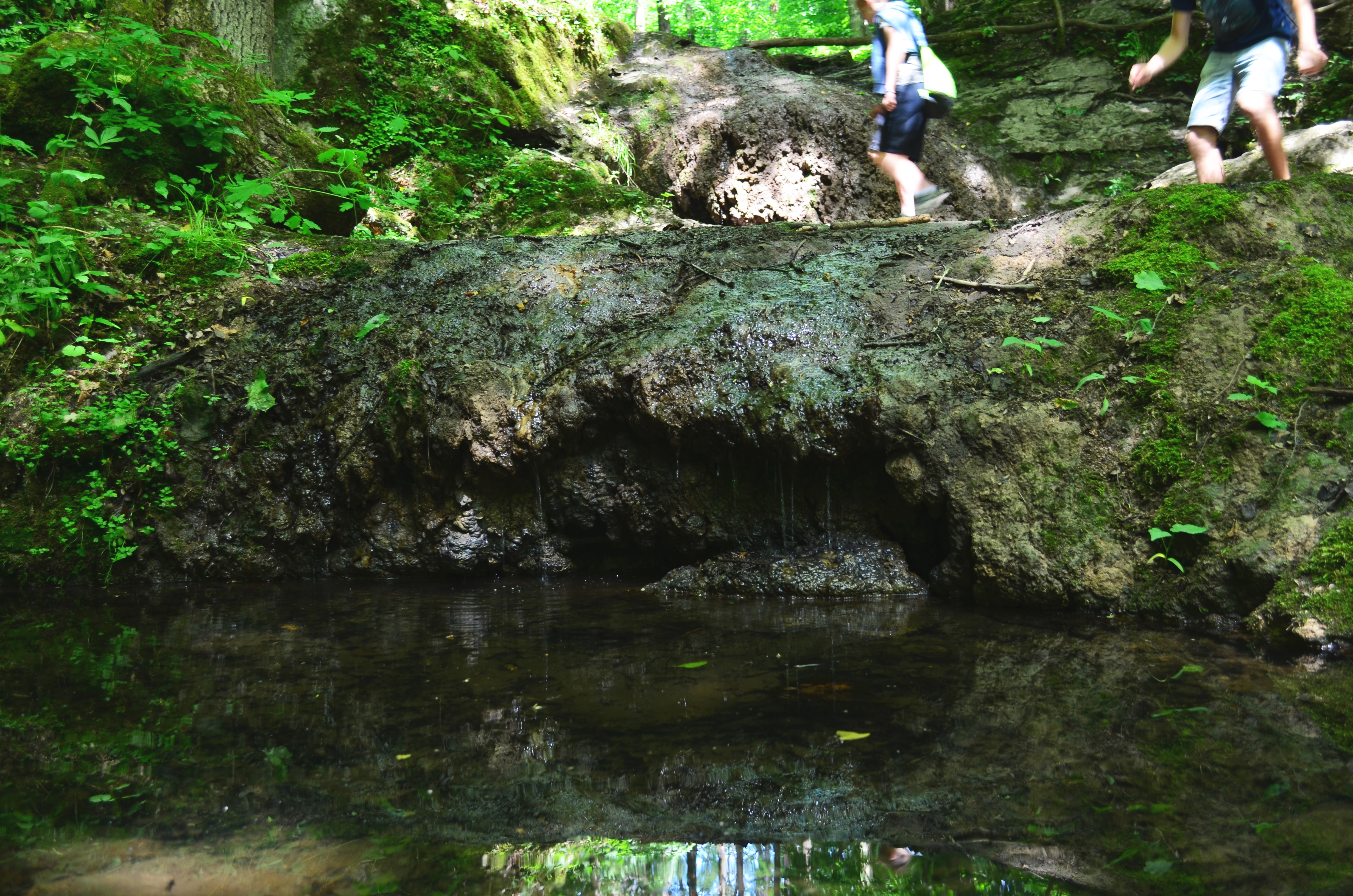 Pohled na vodopád v letním období